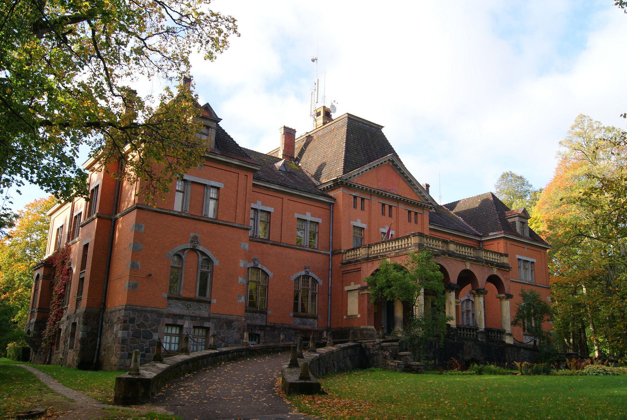 Pelči, Pelču pagasts, LV-3322, Latvia